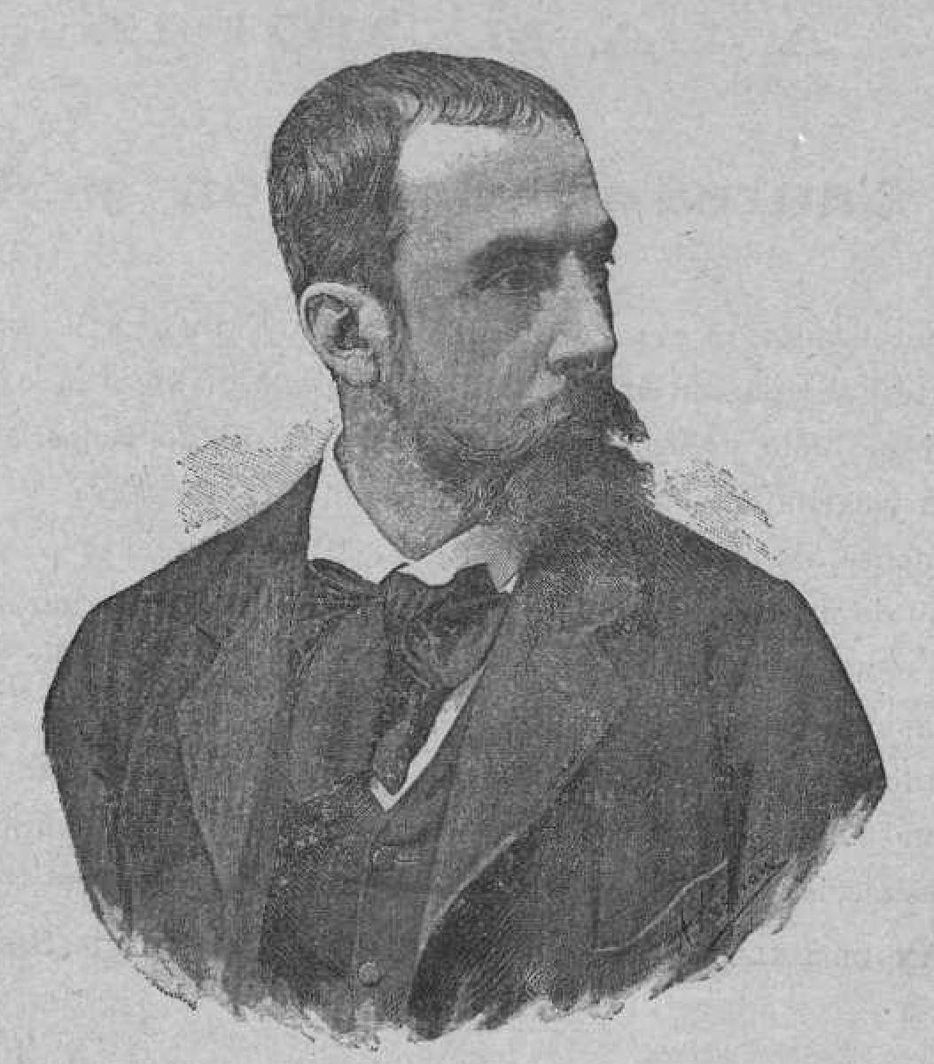 Retrato del científico español Laureano Calderón Arana, en la revista La Farmacia Moderna.